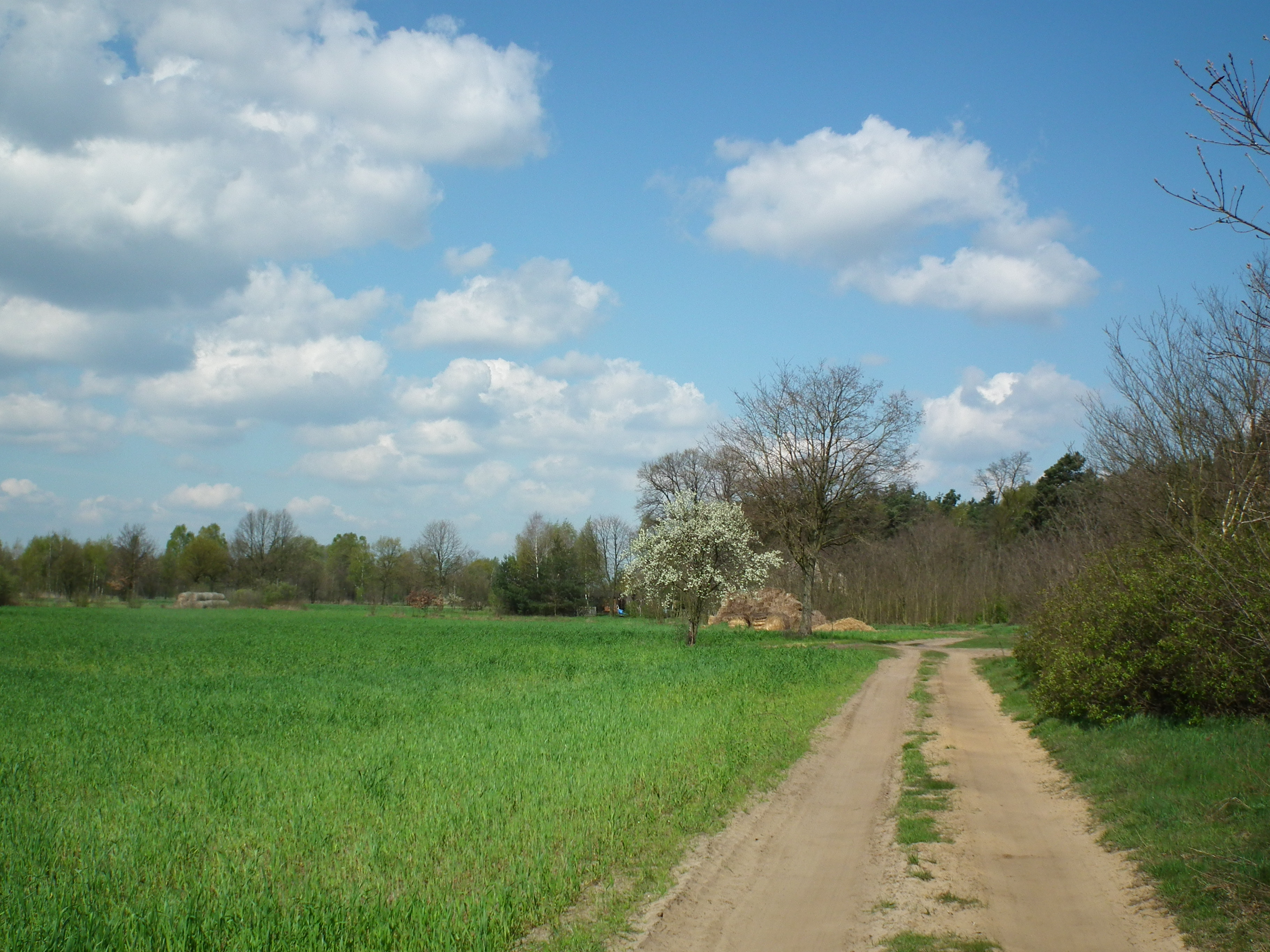 Łazińsk Pierwszy w gm. Zagórów.